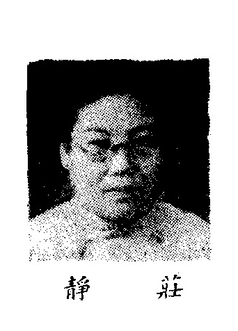 中文（中国大陆）: 制憲國民大會代表